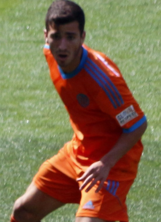 Emirates Cup, 3 d'agost de 2014.